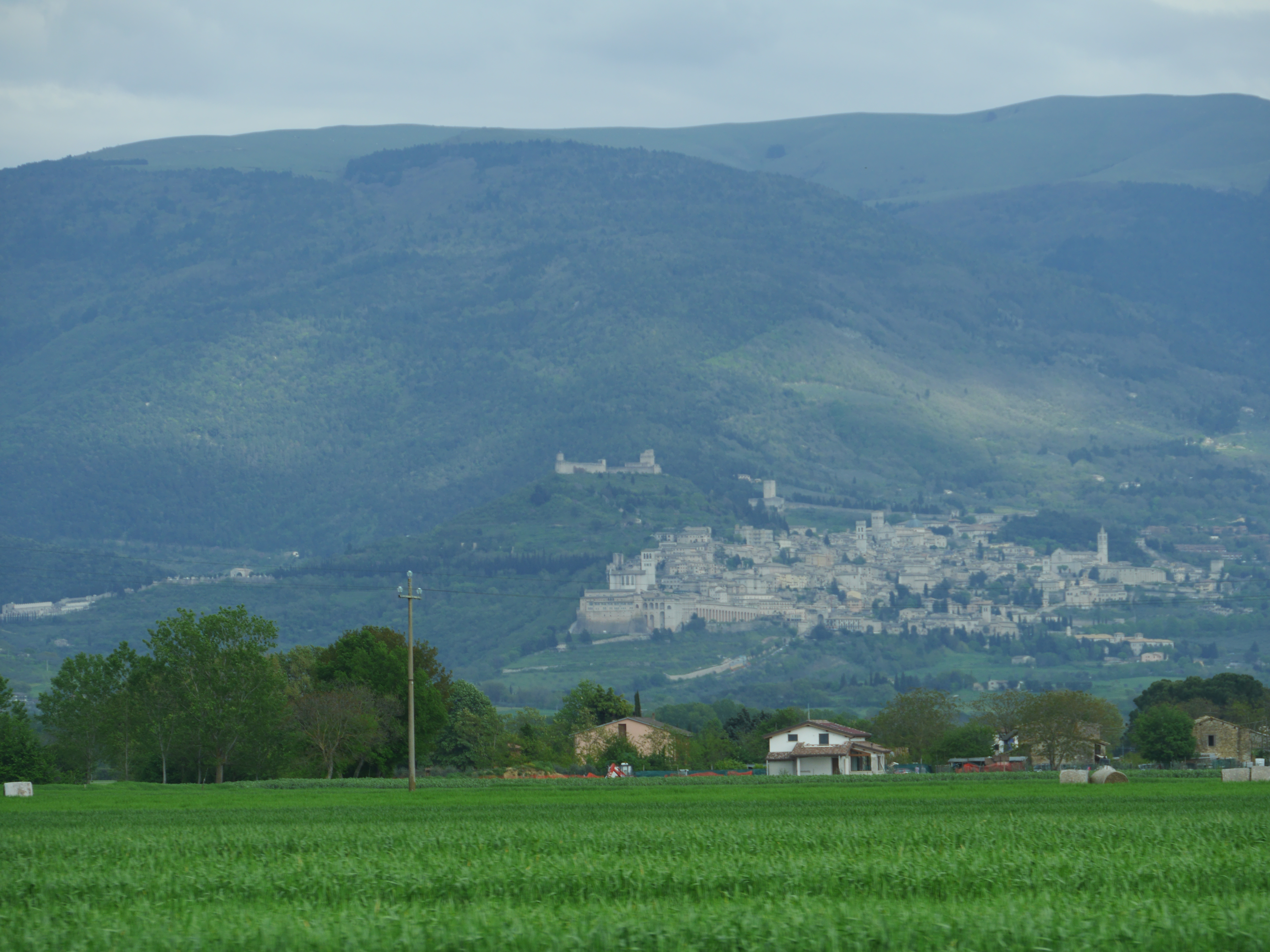 Assisi alle pendici del Monte Subasio This photo was taken with Panasonic Lumix DMC-GH3 camera, thanks to Panasonic.You can see all photographs in category: Taken with Panasonic Lumix DMC-GH3.